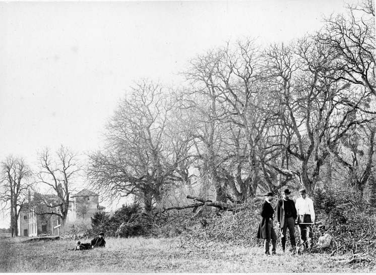 Avenue des Noyers au château de Colombey. Rangée de noyers. Portrait collectif d'hommes. En fond de paysage une tombe avec sa croix et le flanc est du château.